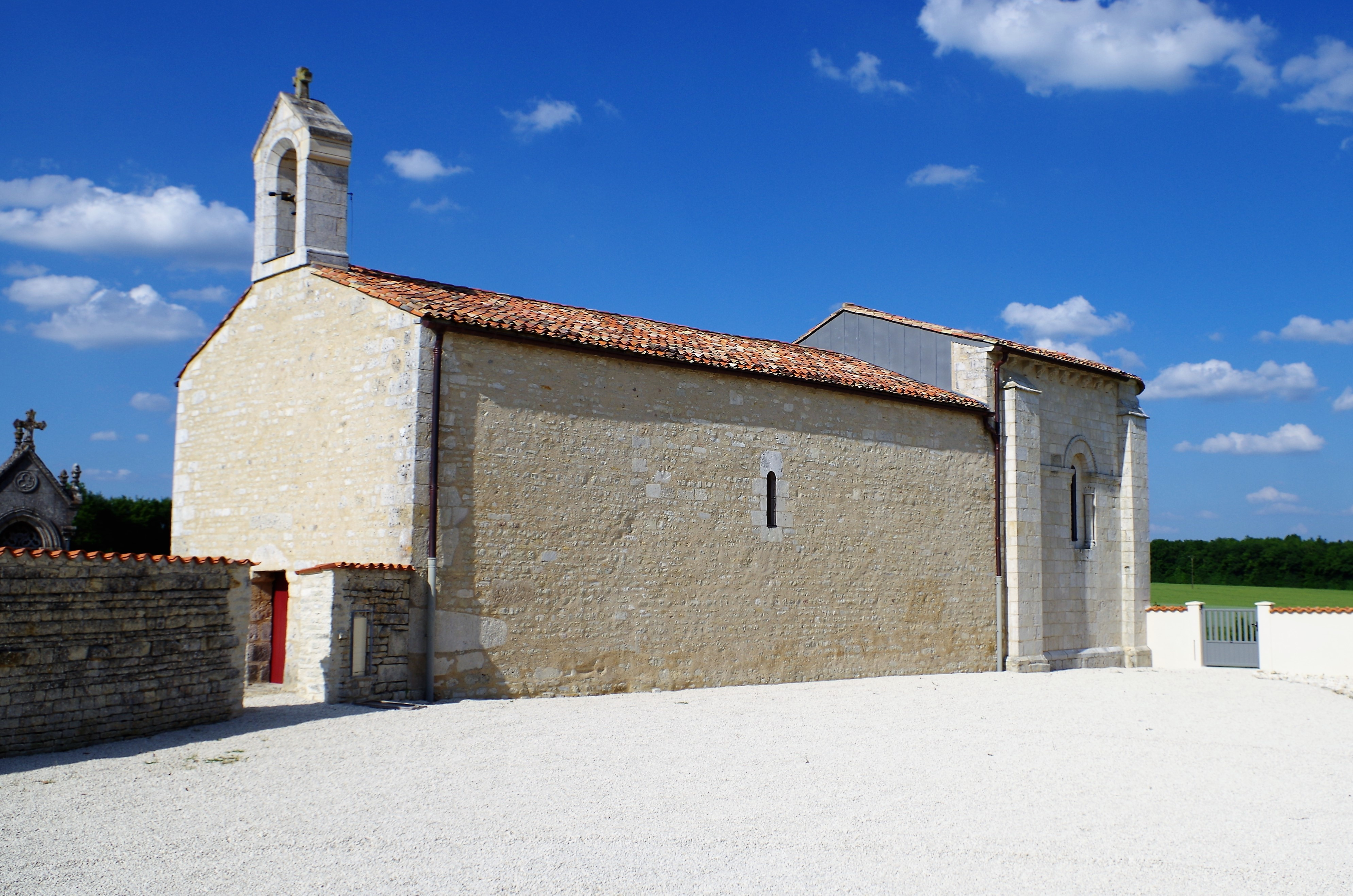 L'église de Vinax après rénovation en 2018.